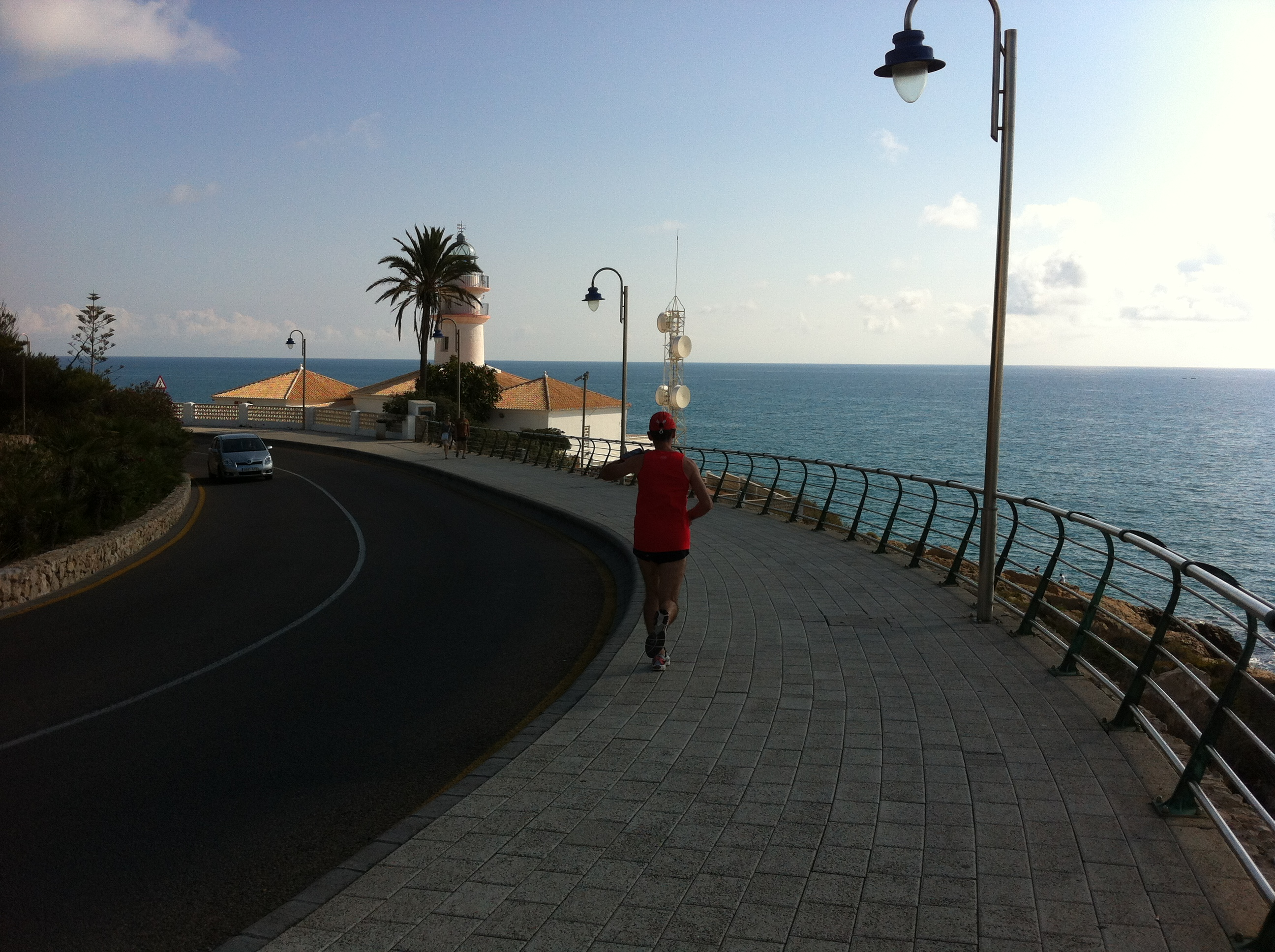 Faro de Cullera y carretera que comunica Cullera con la construcción.